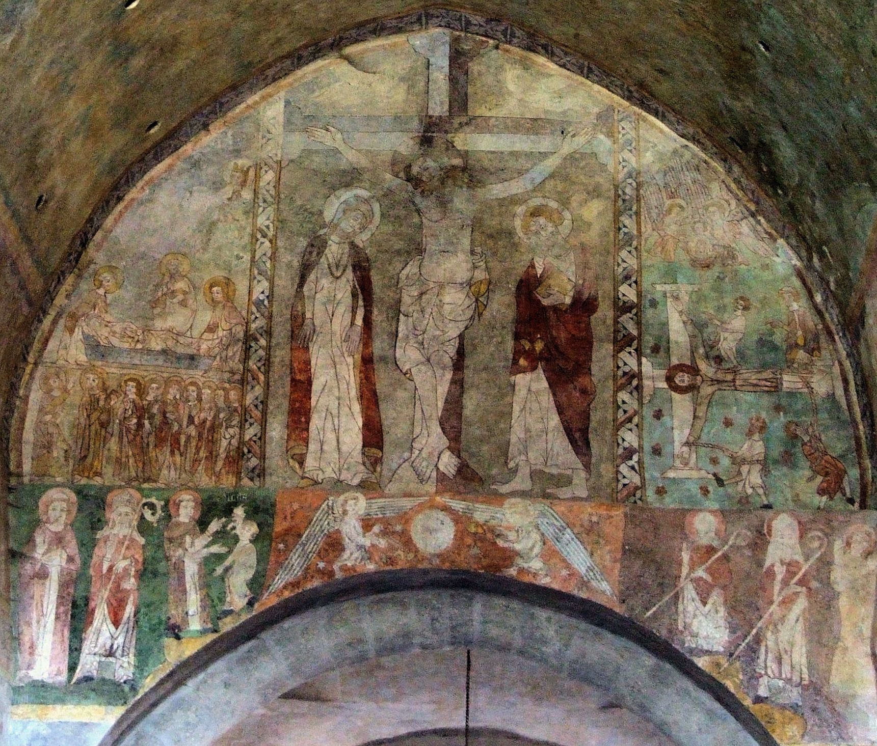 Lavaudieu - Abbatiale - Fresque du XIVe siècle